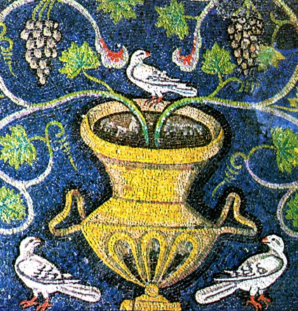 Mosaico de la Basilica di San Vitale en Rávena (Italia). Detalle. Fotografía realizada por Lourdes Cardenal en Rávena. Abril de 2001.